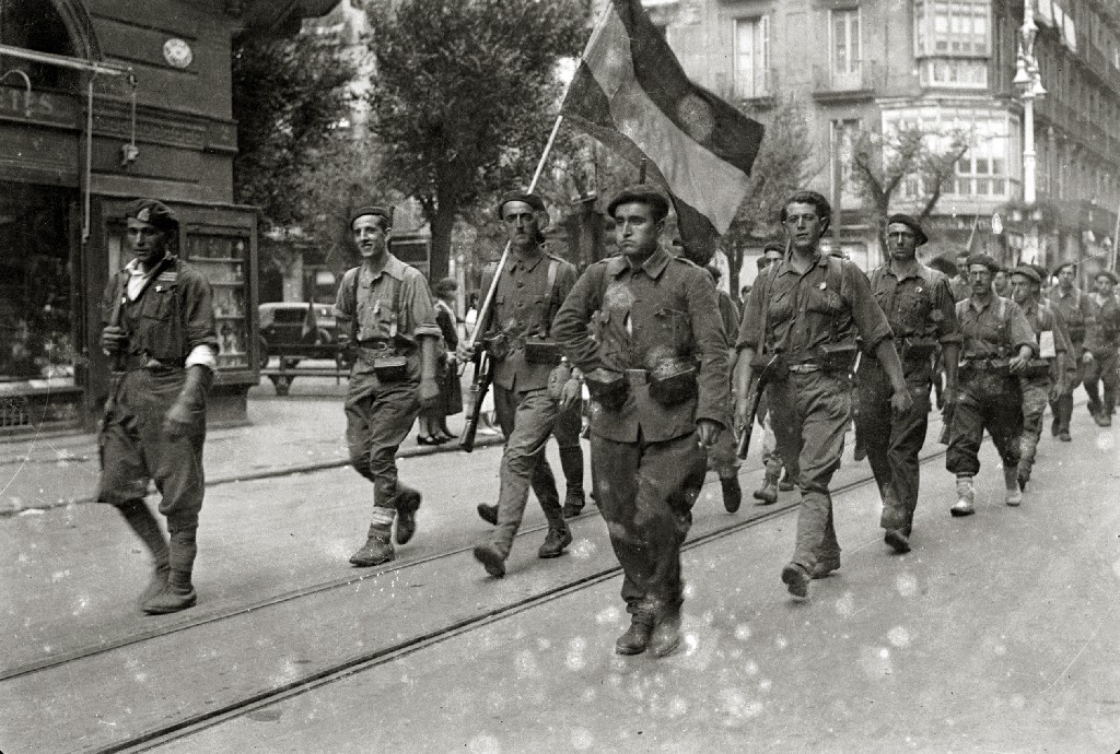 Título original: Entrada de las tropas nacionales en San Sebastián (43/54) Localización: San Sebastián (Guipúzcoa)